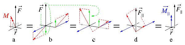 A Force and a Moment is transfered to a displaced Force and a Moment parallel to it.